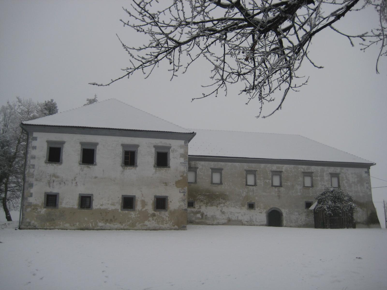 Železne dveri Castle, Slovenia